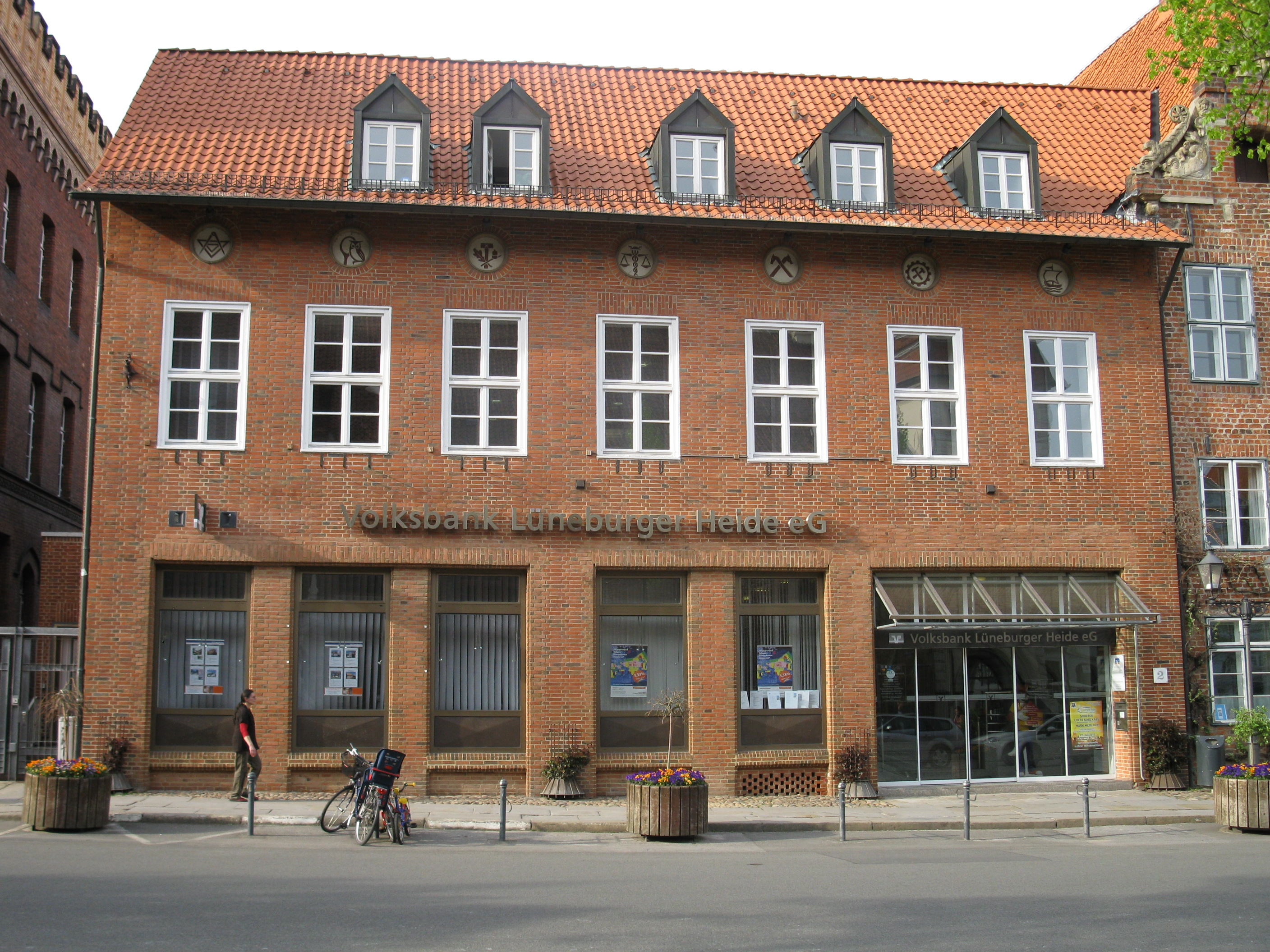 Filiale der Volksbank Lüneburger Heide, Am Ochsenmarkt 2, Lüneburg